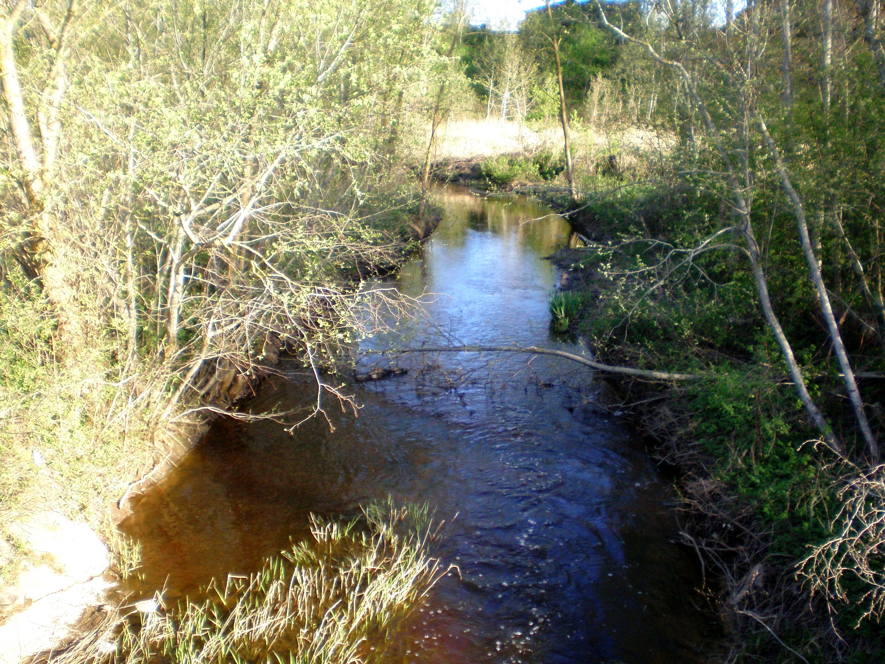 Ažytė ties Ažytėnais, Krakių sen., Kėdainių raj.